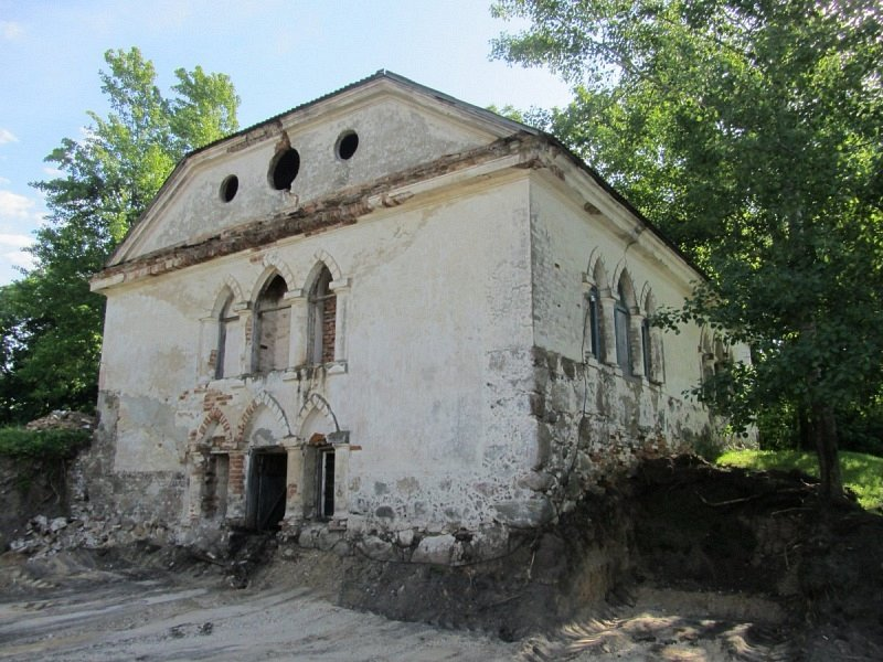 Маліноўшчына. Палаца-паркавы ансамбль Свентаржэцкіх. Флігель